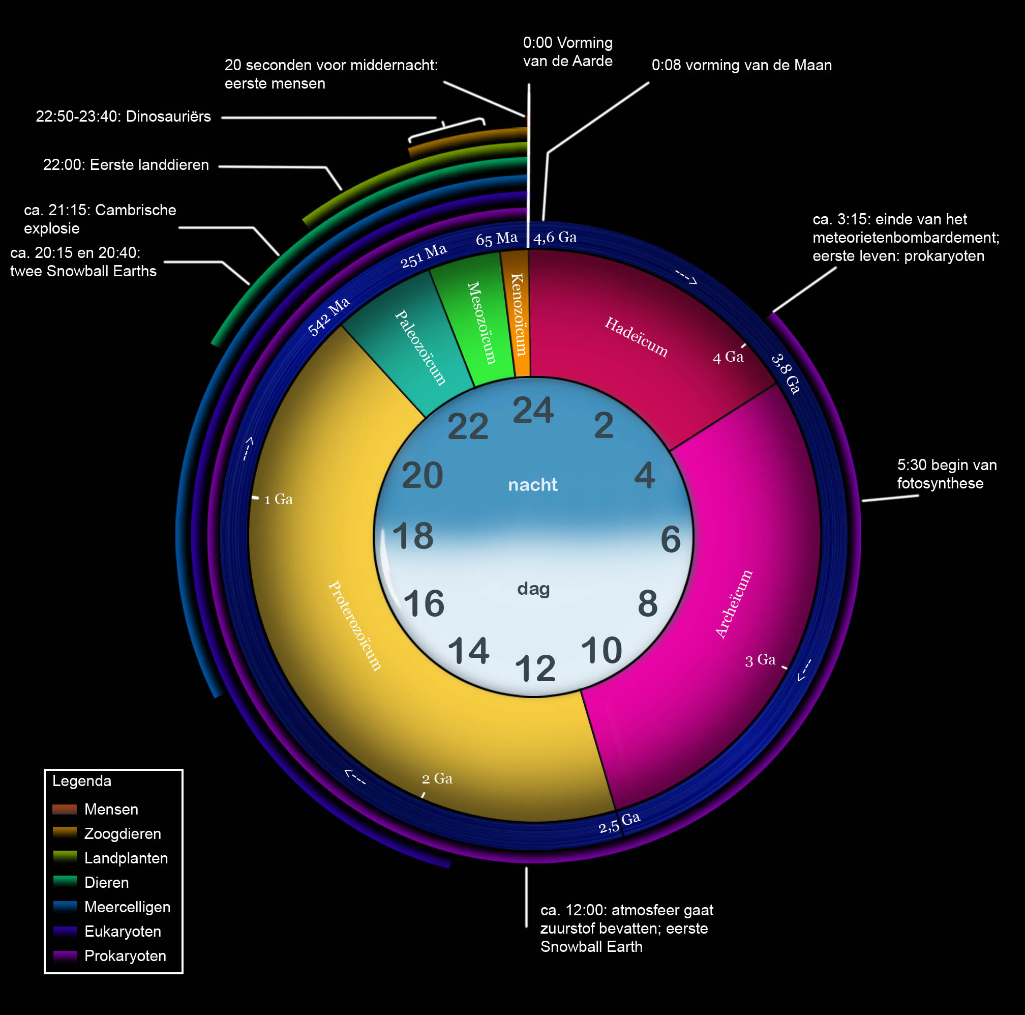 Geologische klok: een representatie van de geschiedenis van de Aarde aan de hand van een klok met 24 uur Ik heb deze afbeelding zelf gephotoshopt.